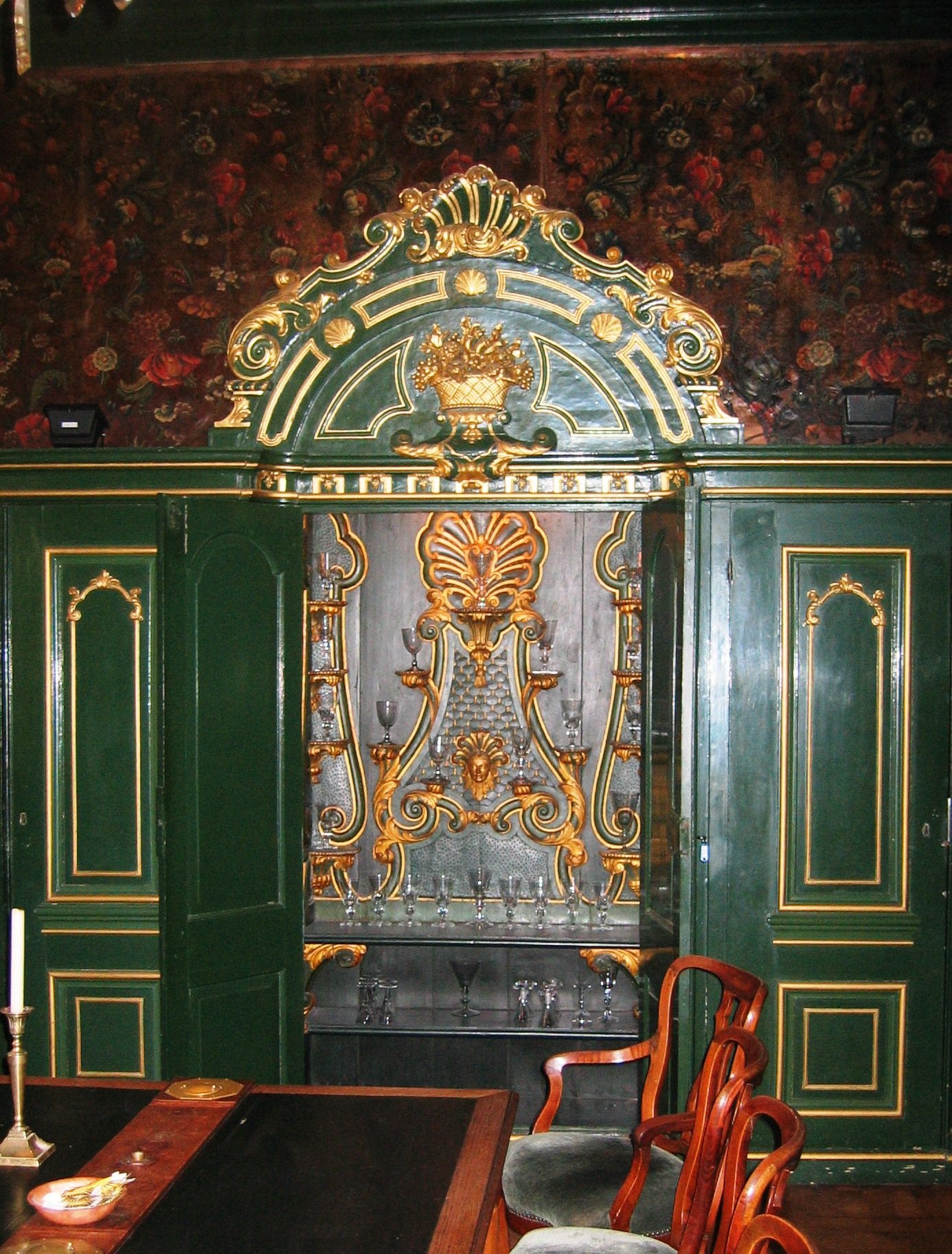 buffetkast Pieterskerk Leiden